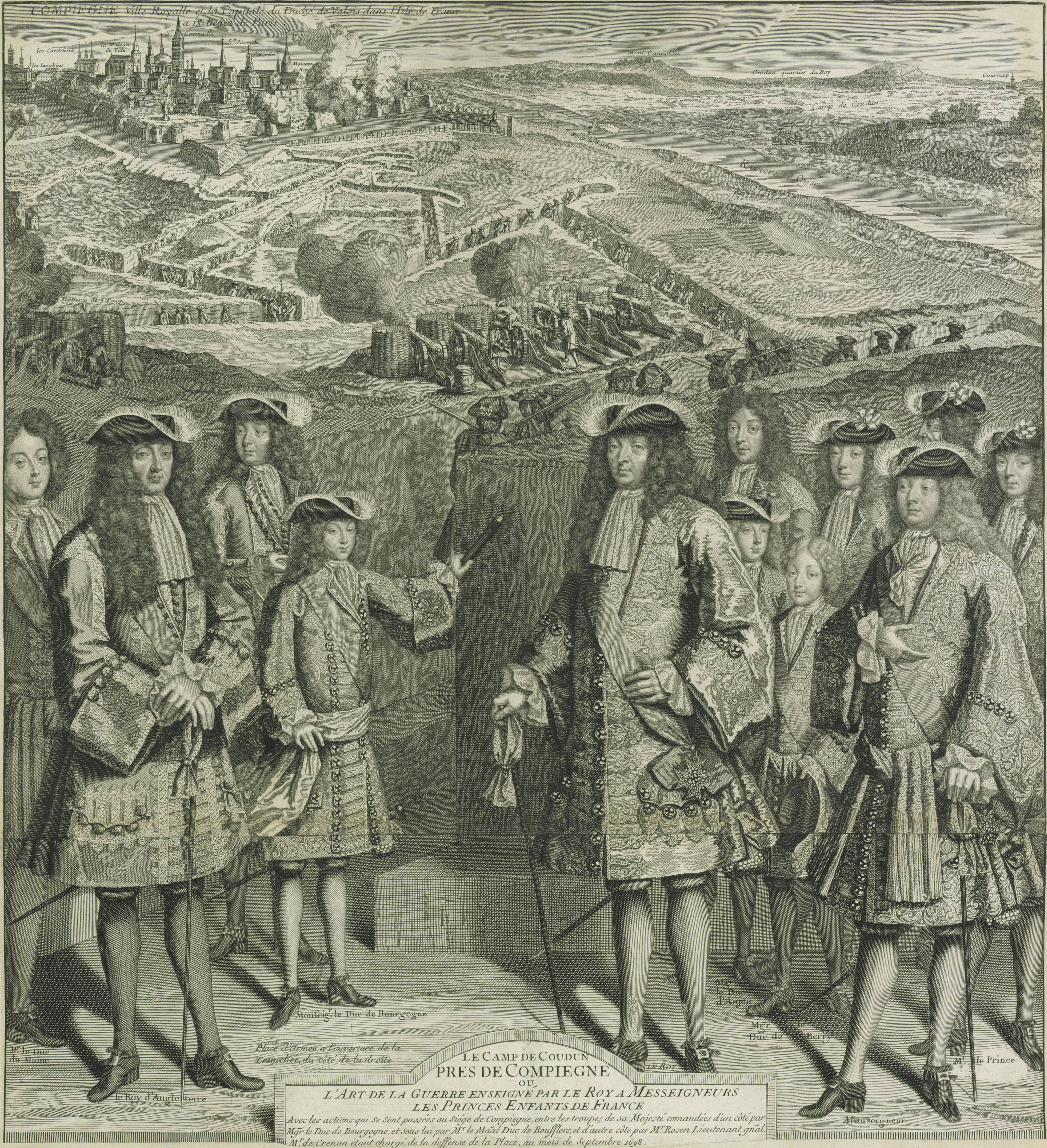 Ludwig XIV. beim sogenannten Lager von Coudon bei Compiègne im September 1698